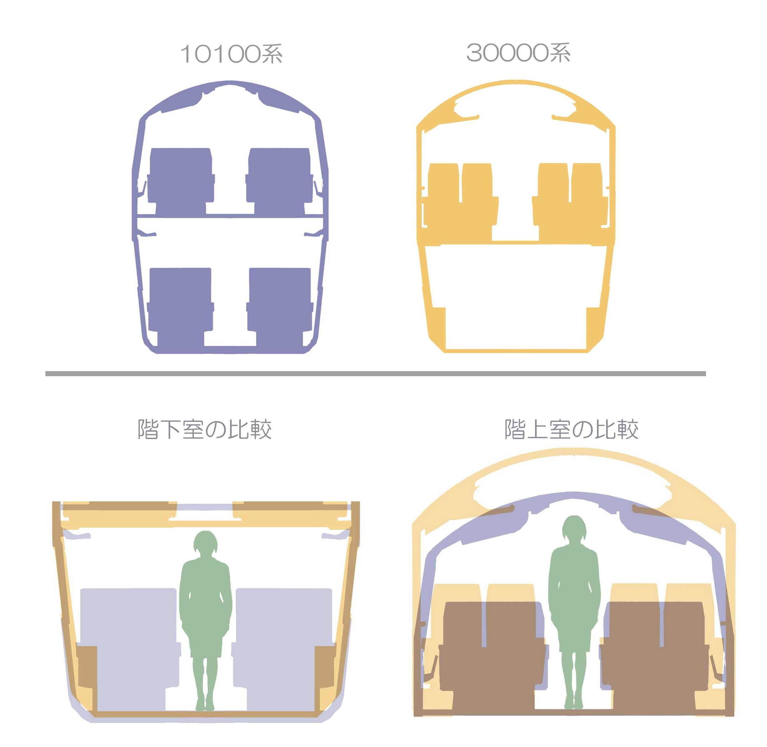 10100系と30000系2階建車の空間比較